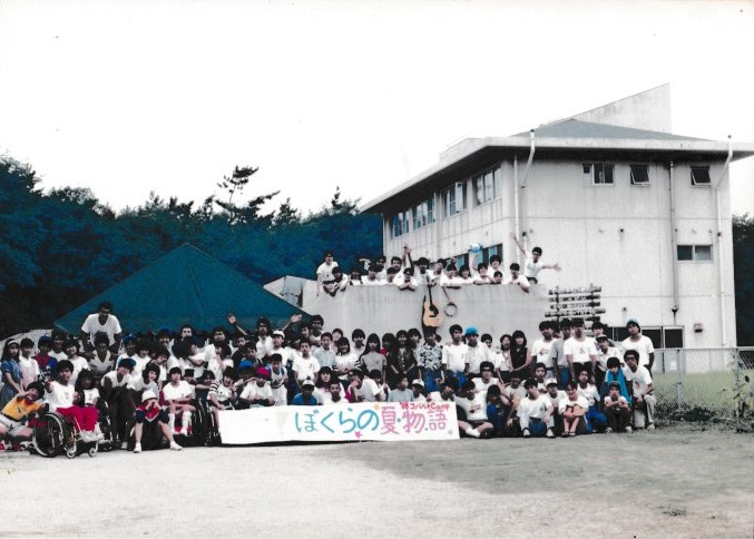 コバルトキャンプ。新館をバックに記念撮影。